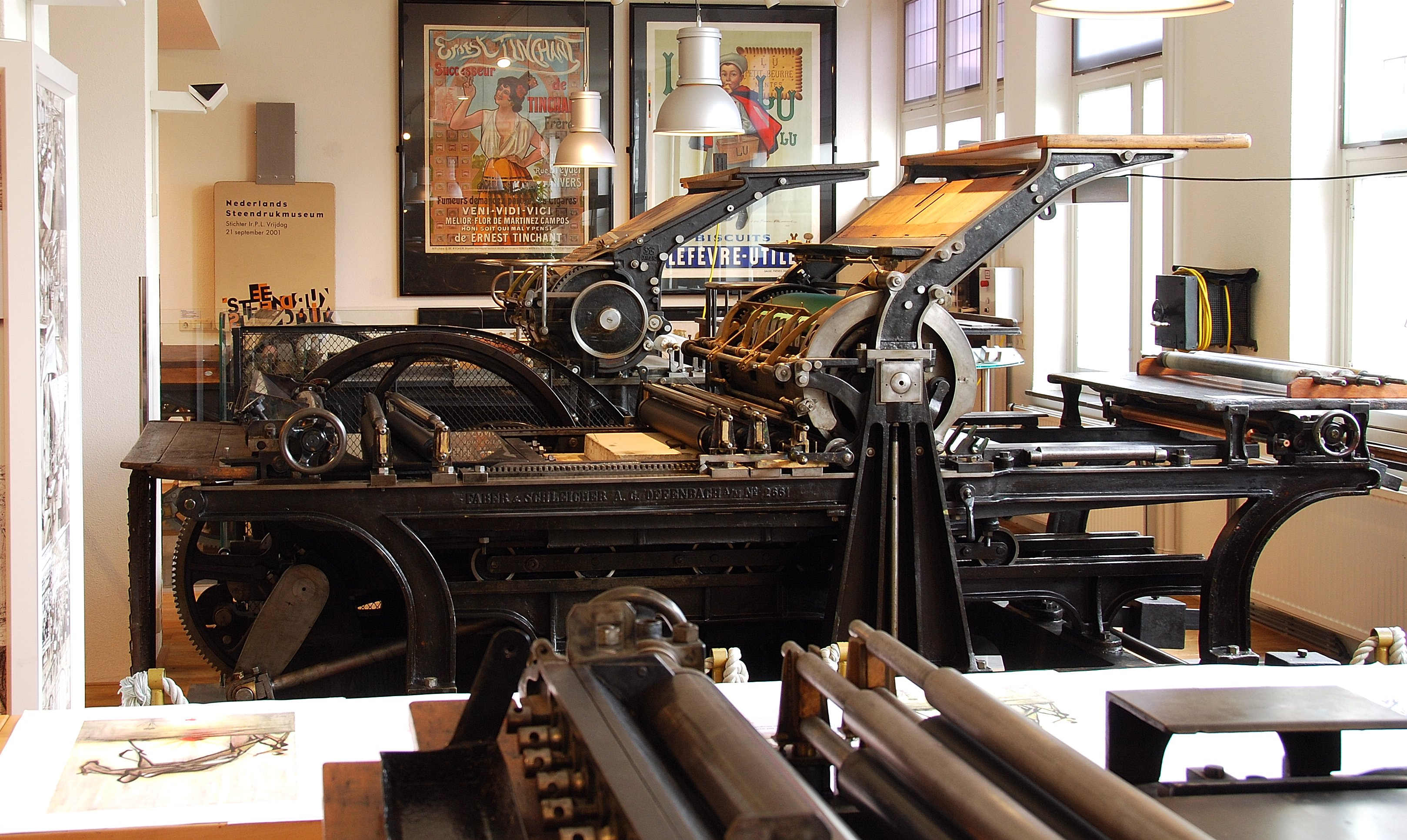 Achteraan een Johanisberger uit 1926; Daarvoor een Faber & Schleicher uit 1900.